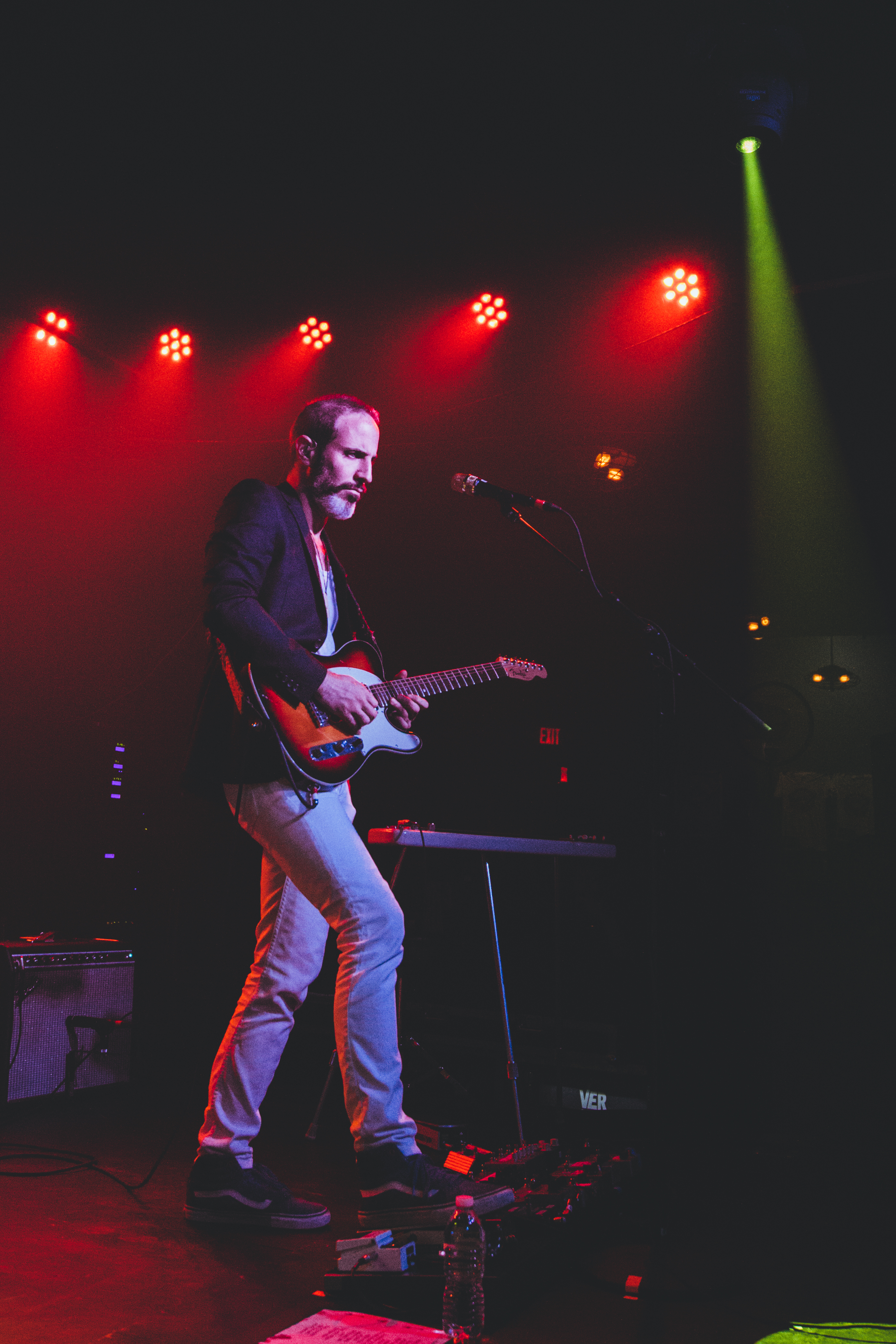 Jenny_Lewis-1875